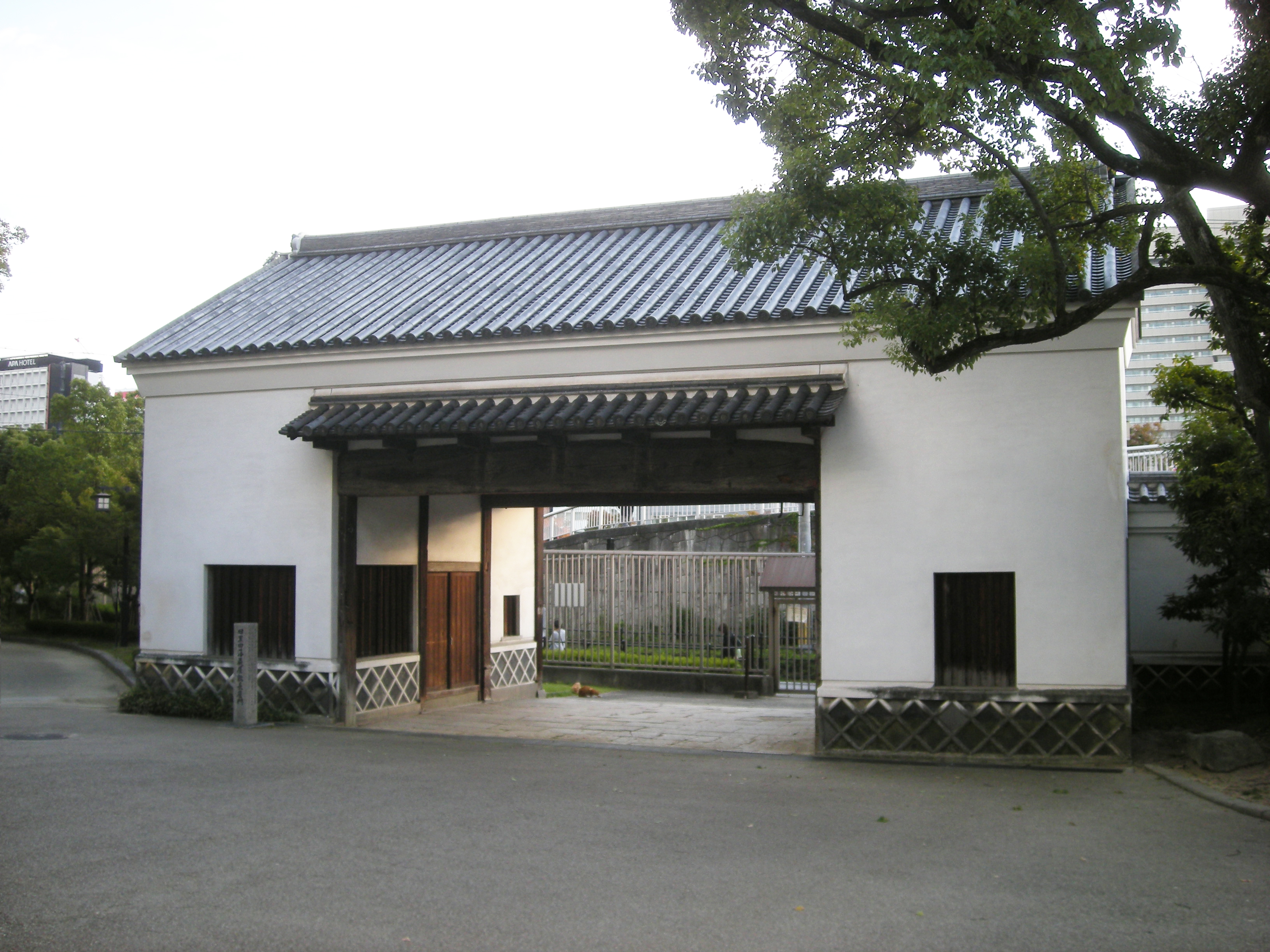 旧黒田藩長屋門